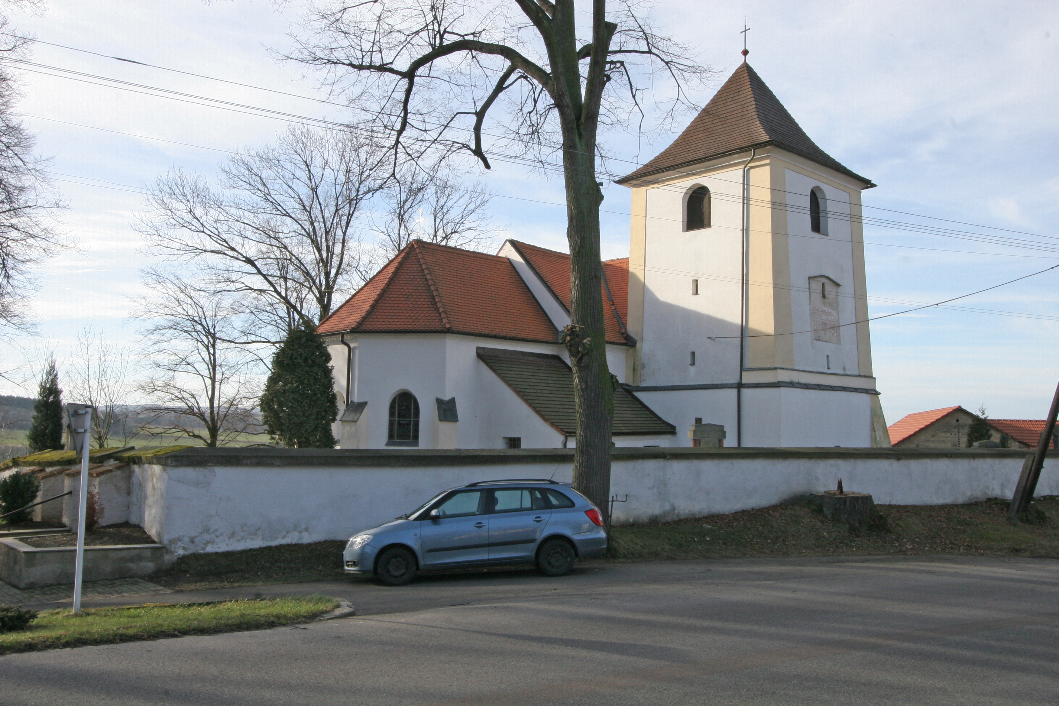 Kostel sv. Jana Křtitele (Perálec), Perálec